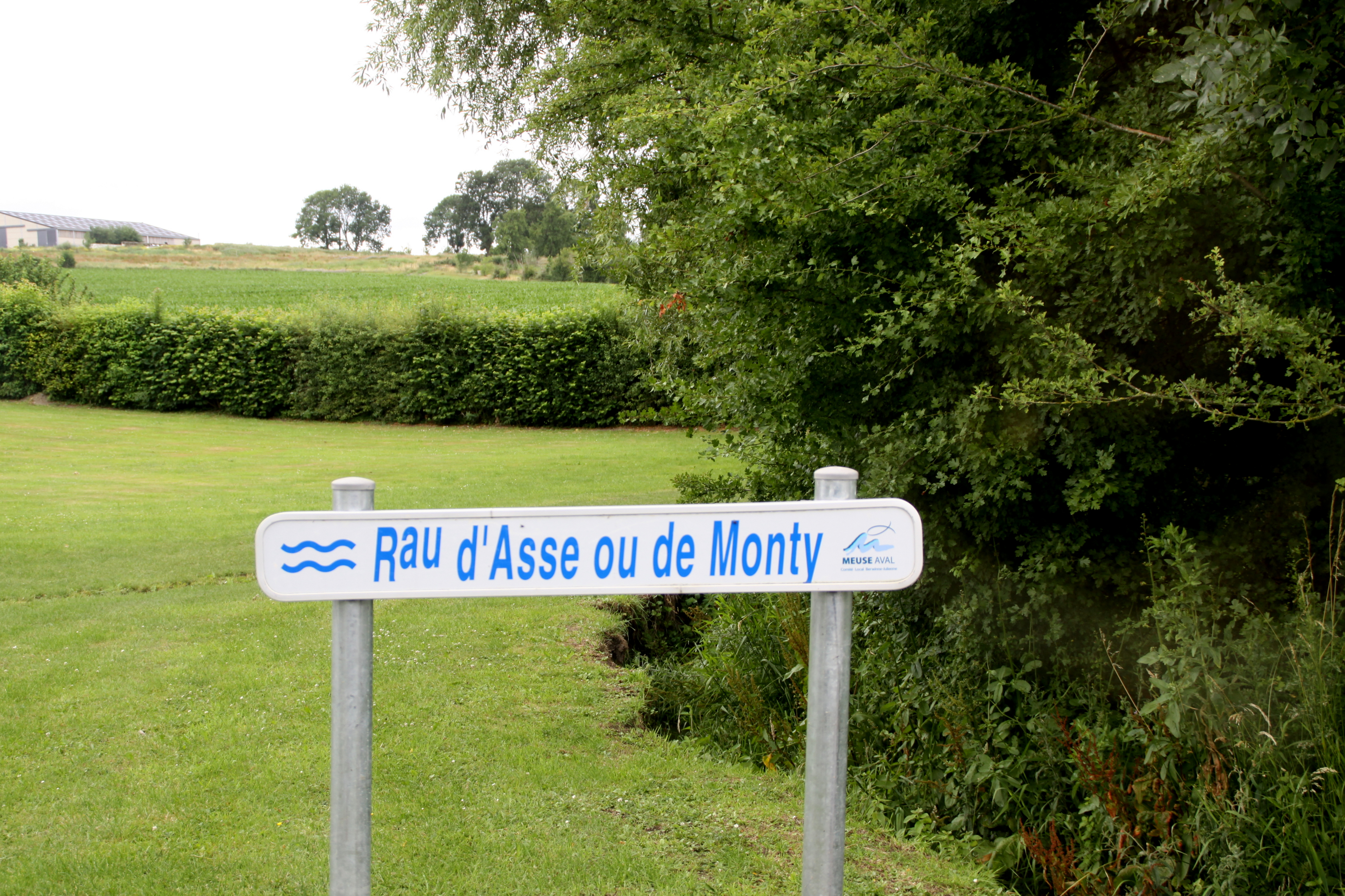 Panneau vum Ruisseau de Monty am Quellgebitt